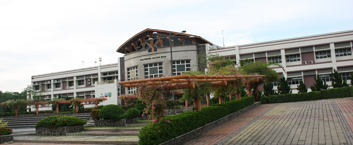 Gedung Utama PCR